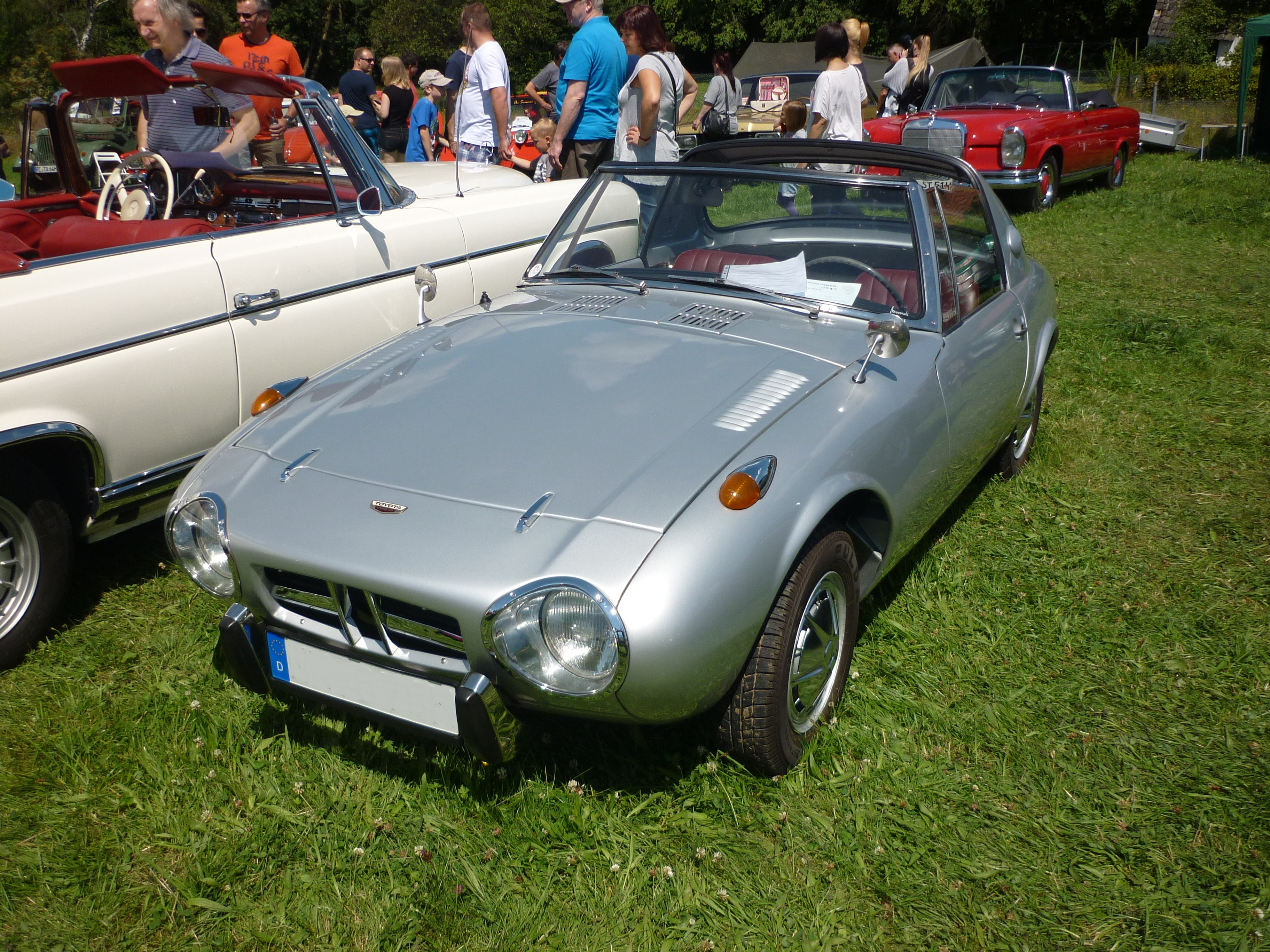 Toyota Sports 800 Linkslenker